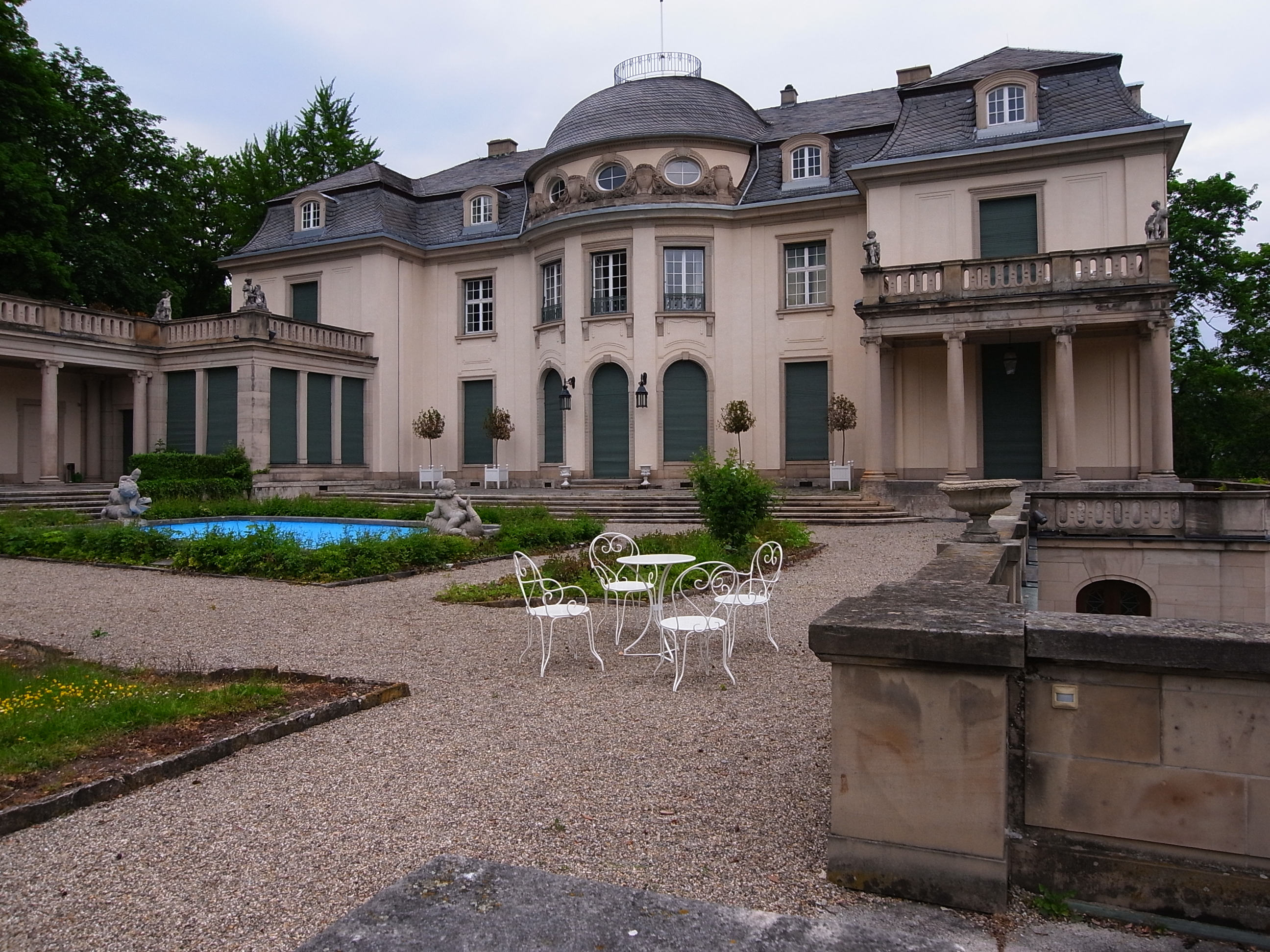 Villa Gemmingen, Ansicht von Süden, Stuttgart, Mörikestraße 12-12A. Architekt: Albert Eitel und Eugen Steigleder, Bauherr: Fritz Freiherr von Gemmingen-Hornberg, Baujahr: 1910–1911.